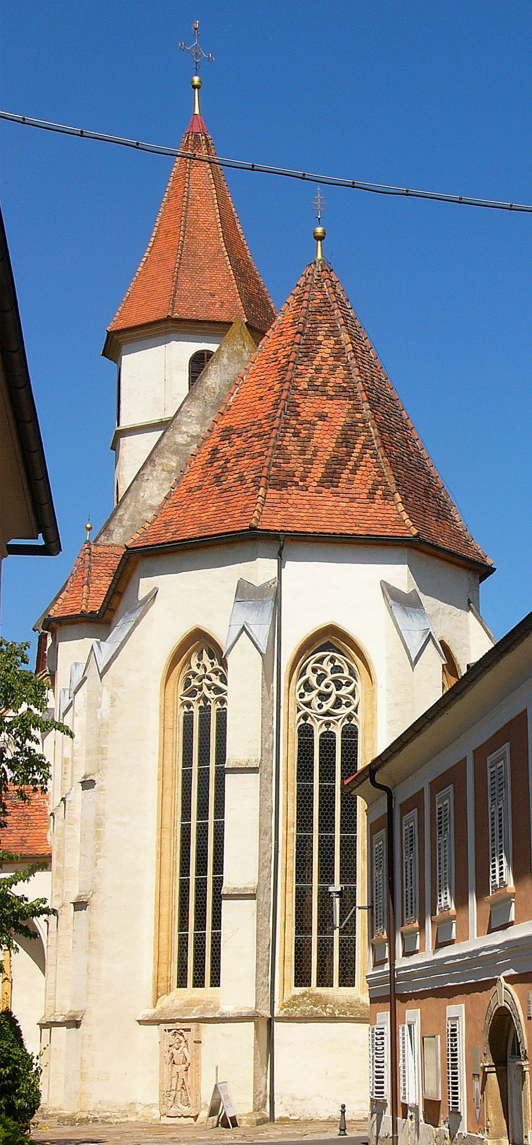 Die Apsis der Bad Radkersberger Pfarrkirche.